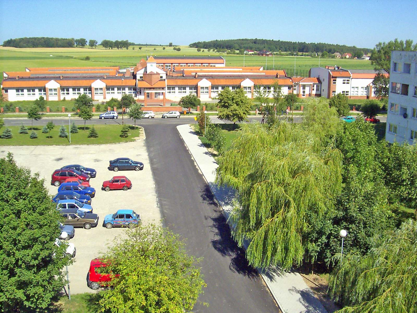 Lato w klimacie umiarkowanym